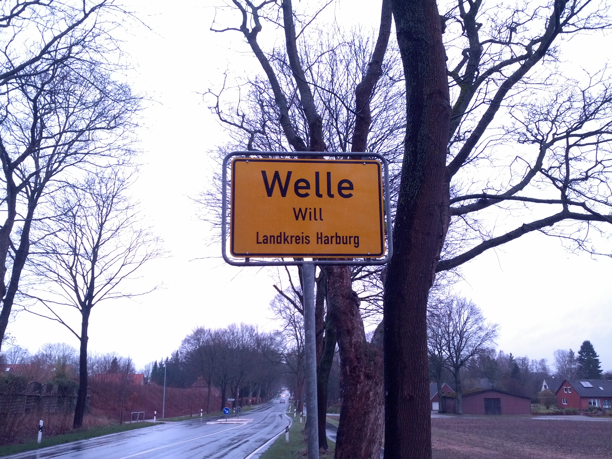 Oortsschild mit den Naam op Hoochdüütsch un op Plattdüütsch